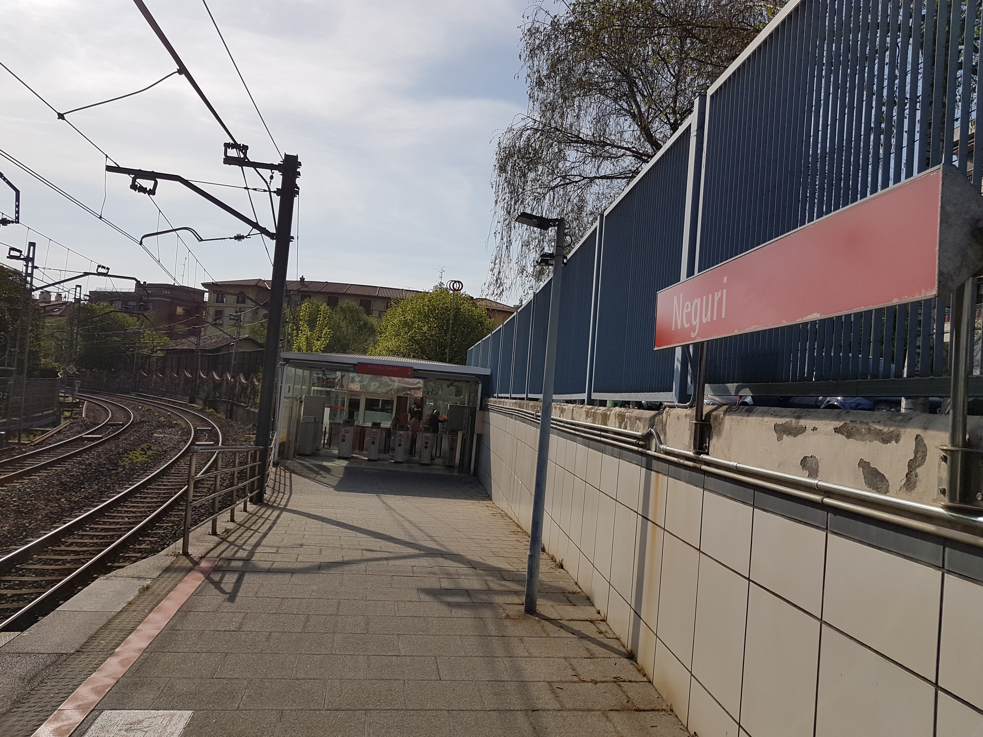 Estación de Neguri.